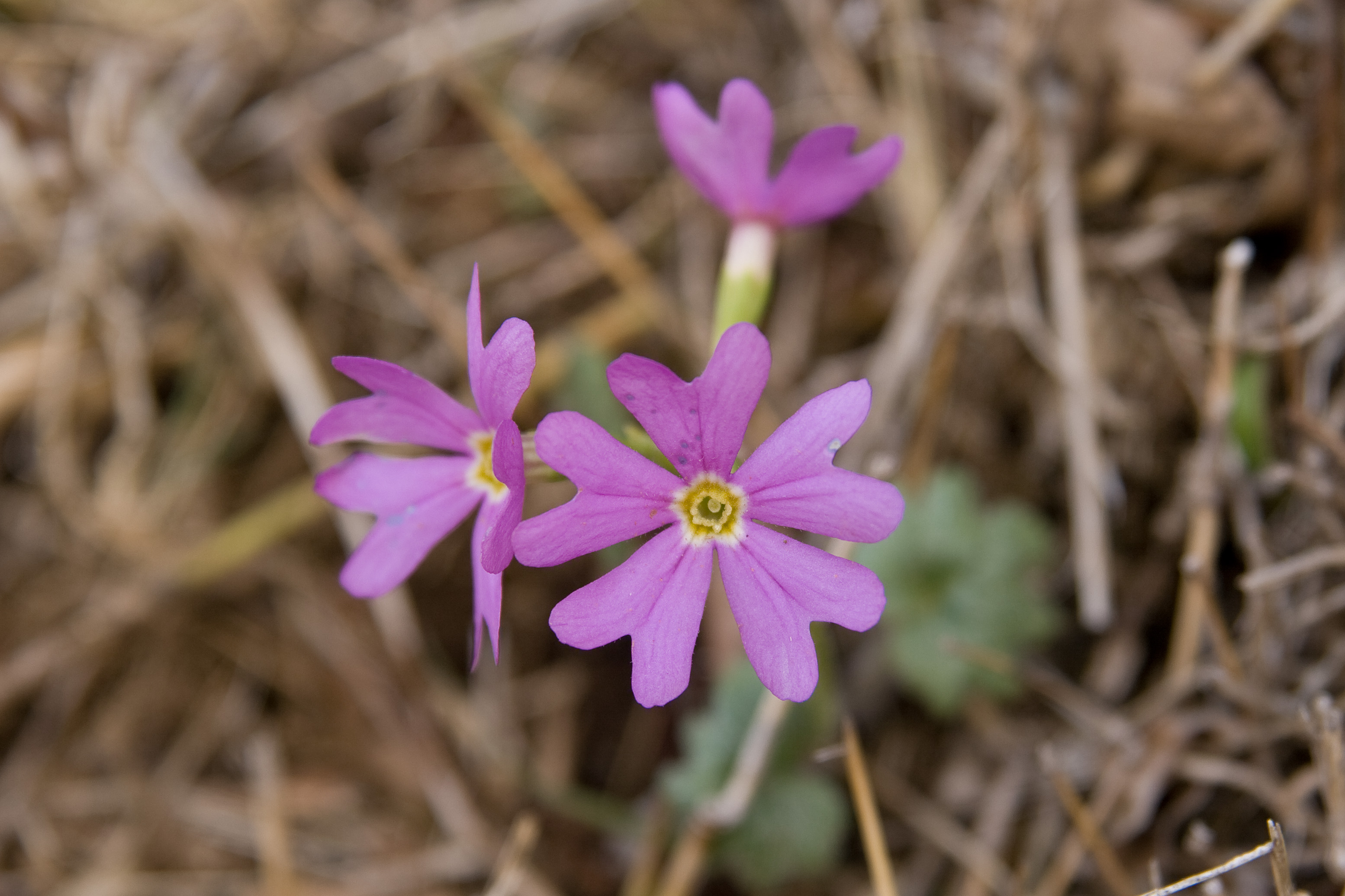 コイワザクラ (学名:Primula reinii)